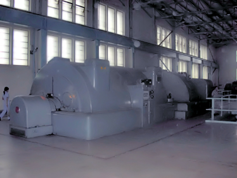 Máy phát điện tua bin hơi 66 MW